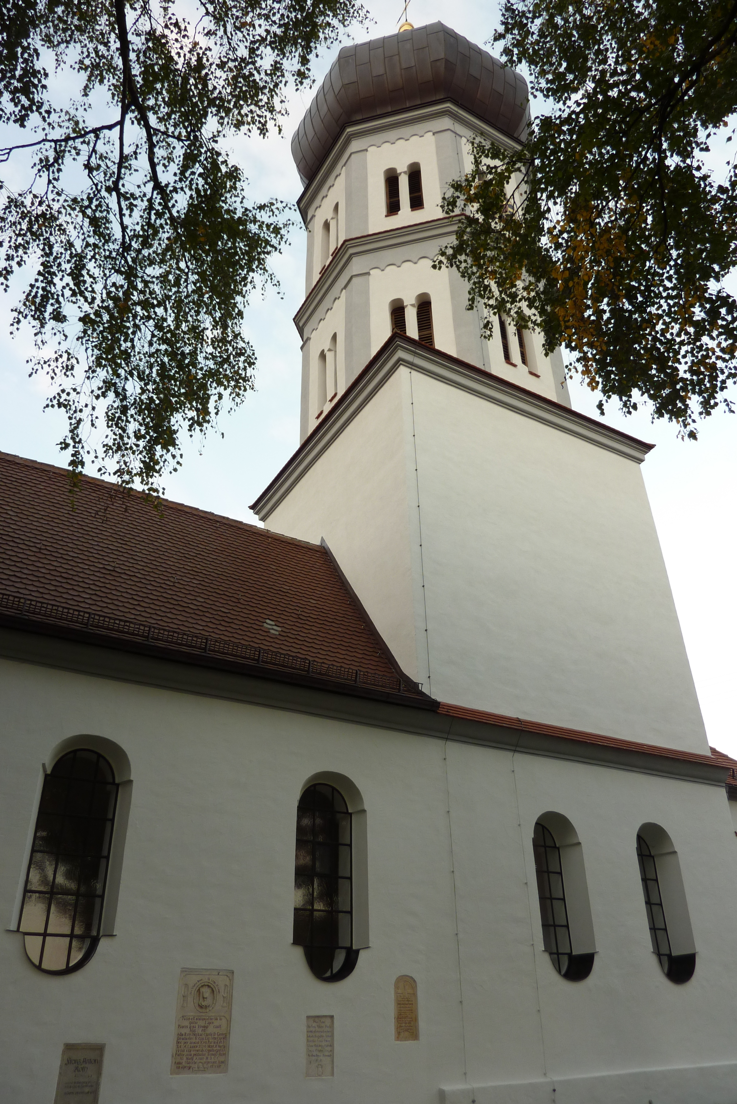 Katholische Pfarrkirche St. Veronika in Ziertheim (Landkreis Dillingen an der Donau), Chorturm und Langhaus, Ansicht von Süden